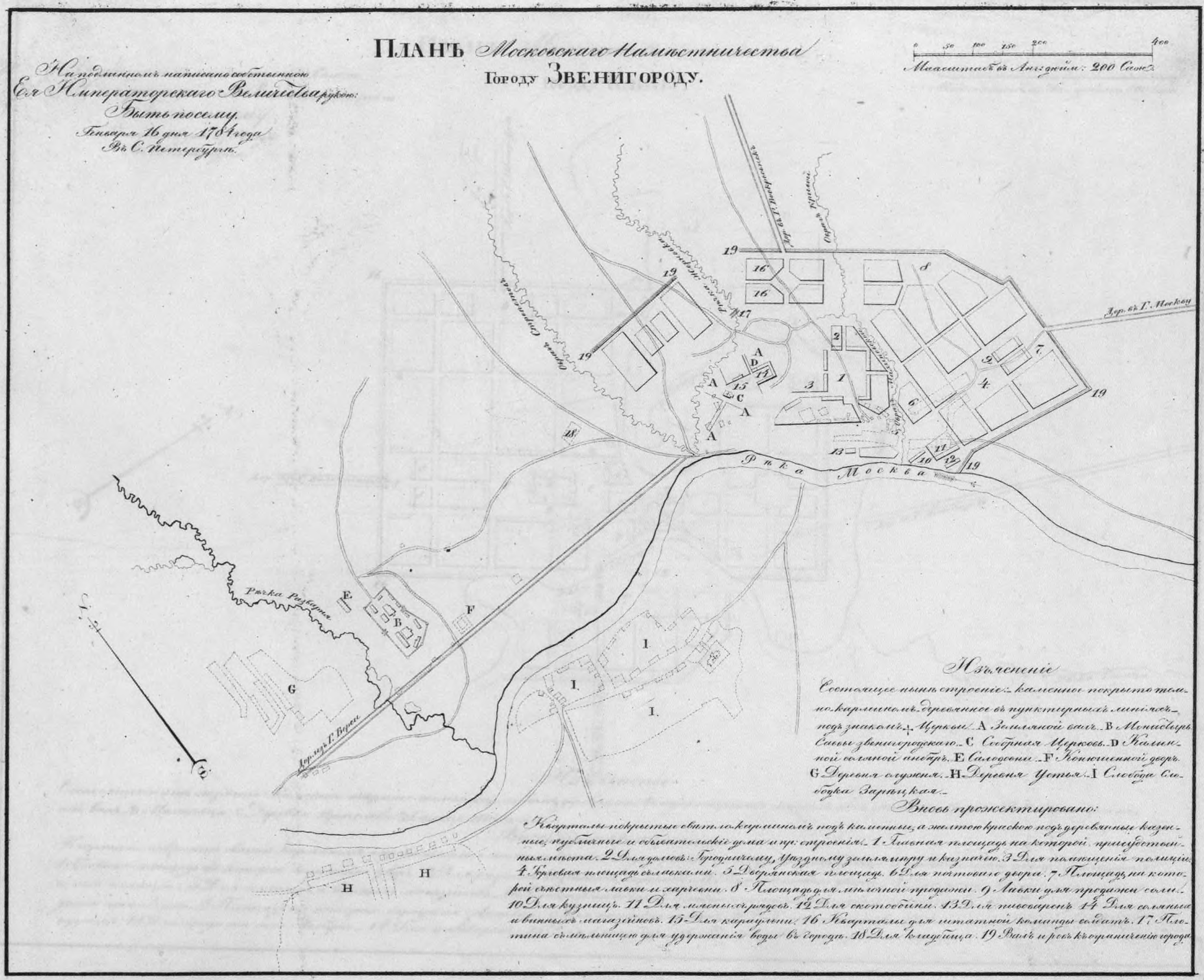 Полное Собрание Законов Российской Империи. Собрание первое. Книга чертежей и рисунков. (Планы городов).; 1839, Санктпетербургъ, Въ Типографіи II Отделенія Собственной Е. И. В. Канцеляріи.